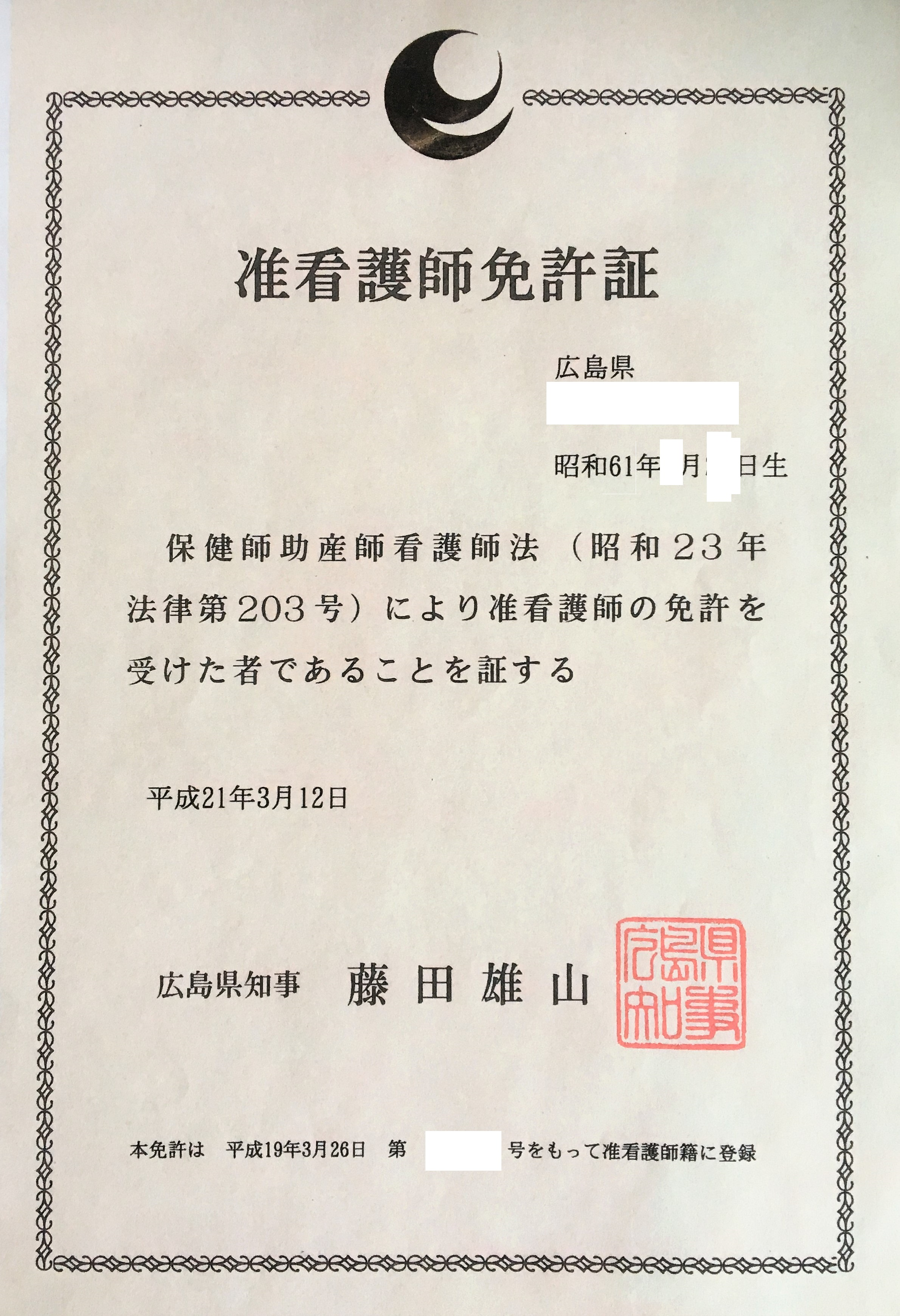 准看護師の免許証。都道府県知事が認定する。広島県の免状。県によって若干デザインは異なる。